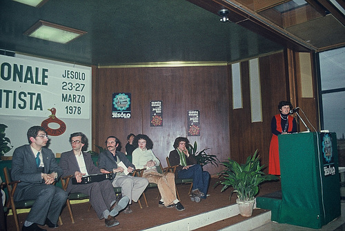 La dua IJF en Lido di Jesolo: Michela Lipari laŭdas Bruĉjon Casini. Aŭskultas la aliaj tiamaj TEJO-komitatanoj: Csaba Lendvay, Floreal Gabalda, Gert van Tongerloo kaj Thomas Bormann.